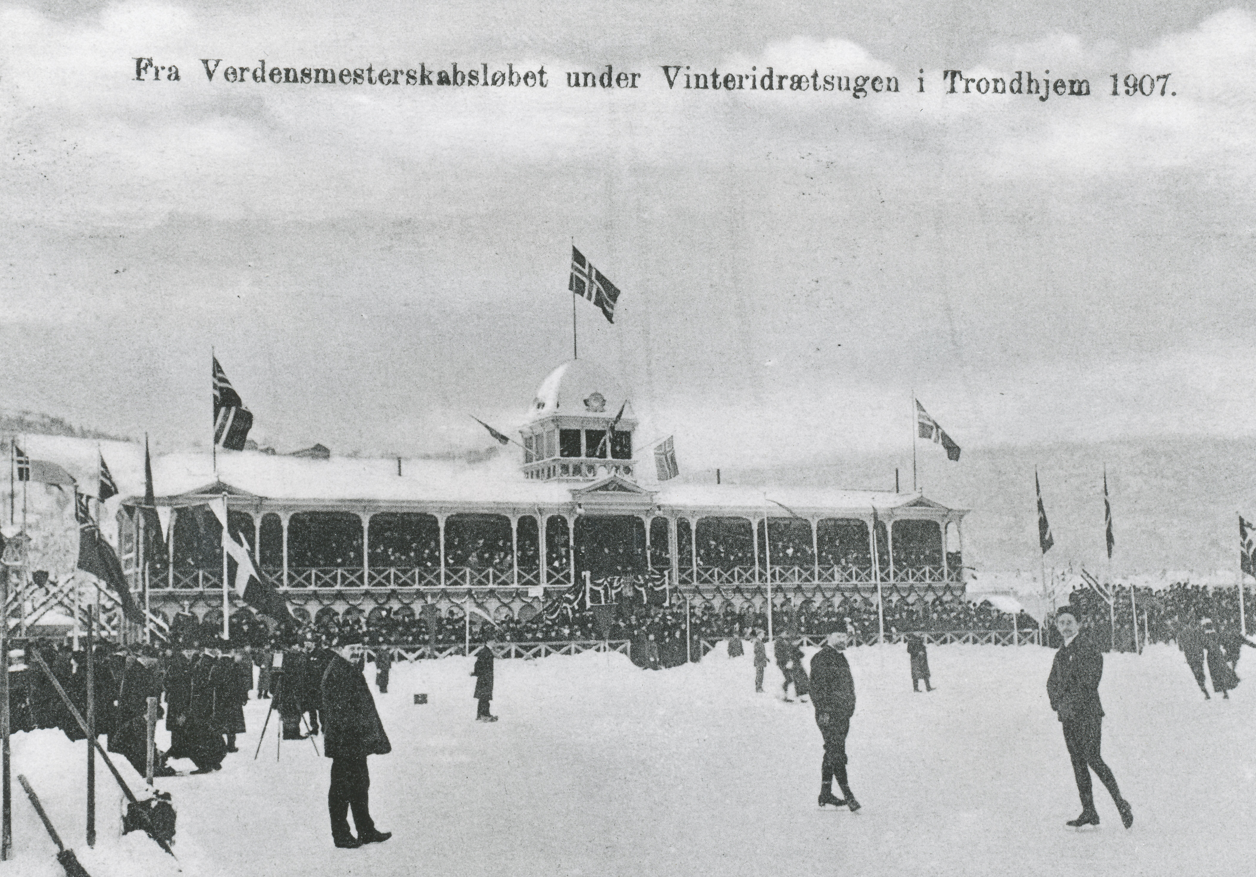 Verdensmesterskapet på Stadion i 1907. Fra et postkort. Kopi: Esther Nordmark. Ukjent fotograf.